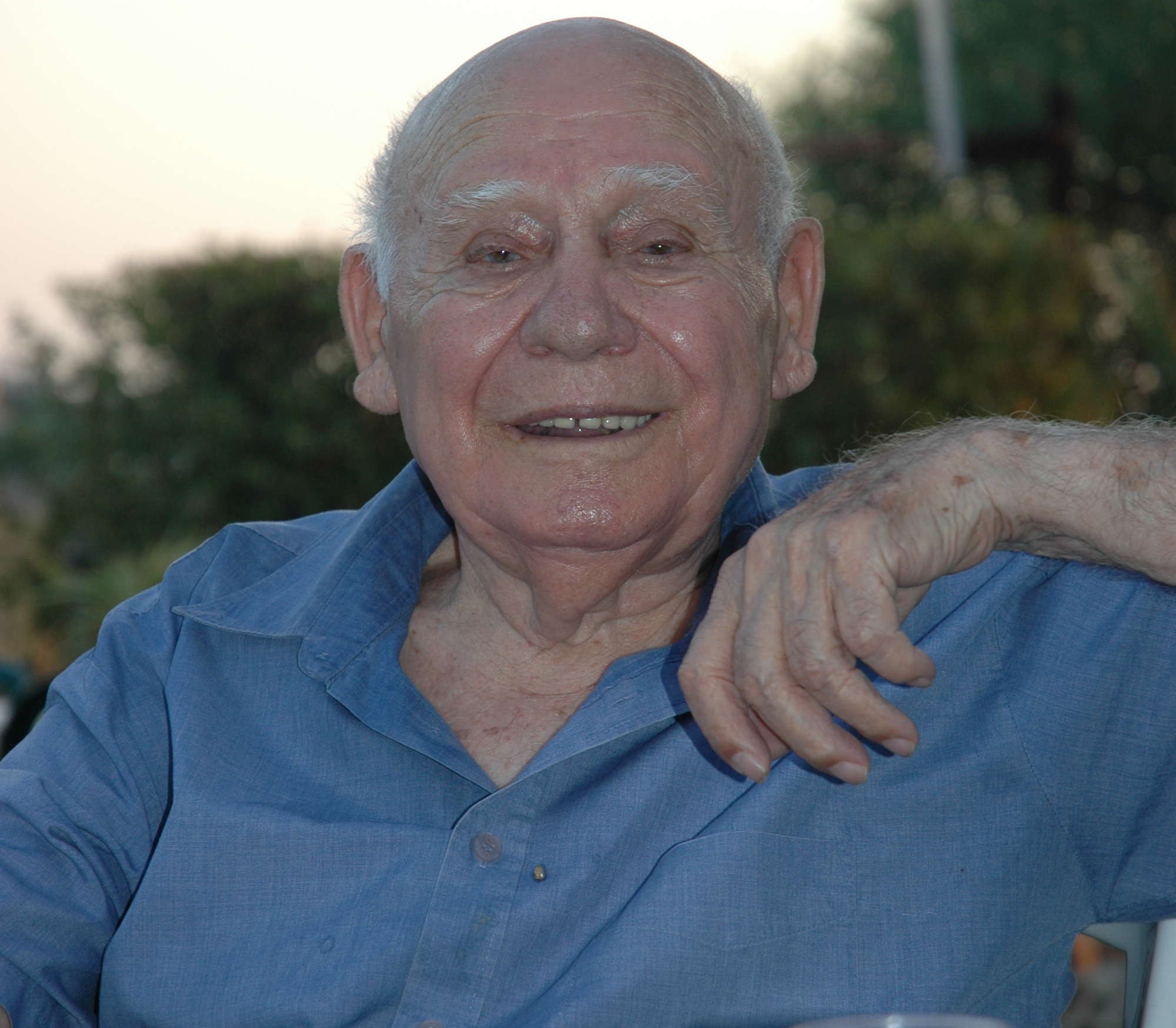 ירחמיאל אסא